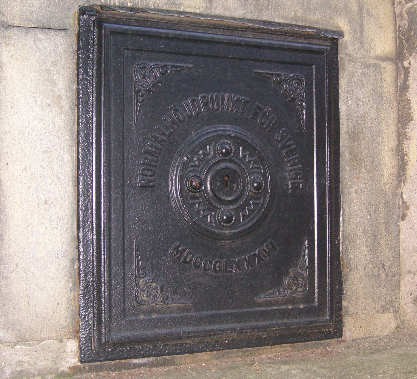 Sveriges eller Rikets nollpunkt (RH00) på Riddarholmen i Stockholm, "Normalhöjdpunkt för Sverige 1886".